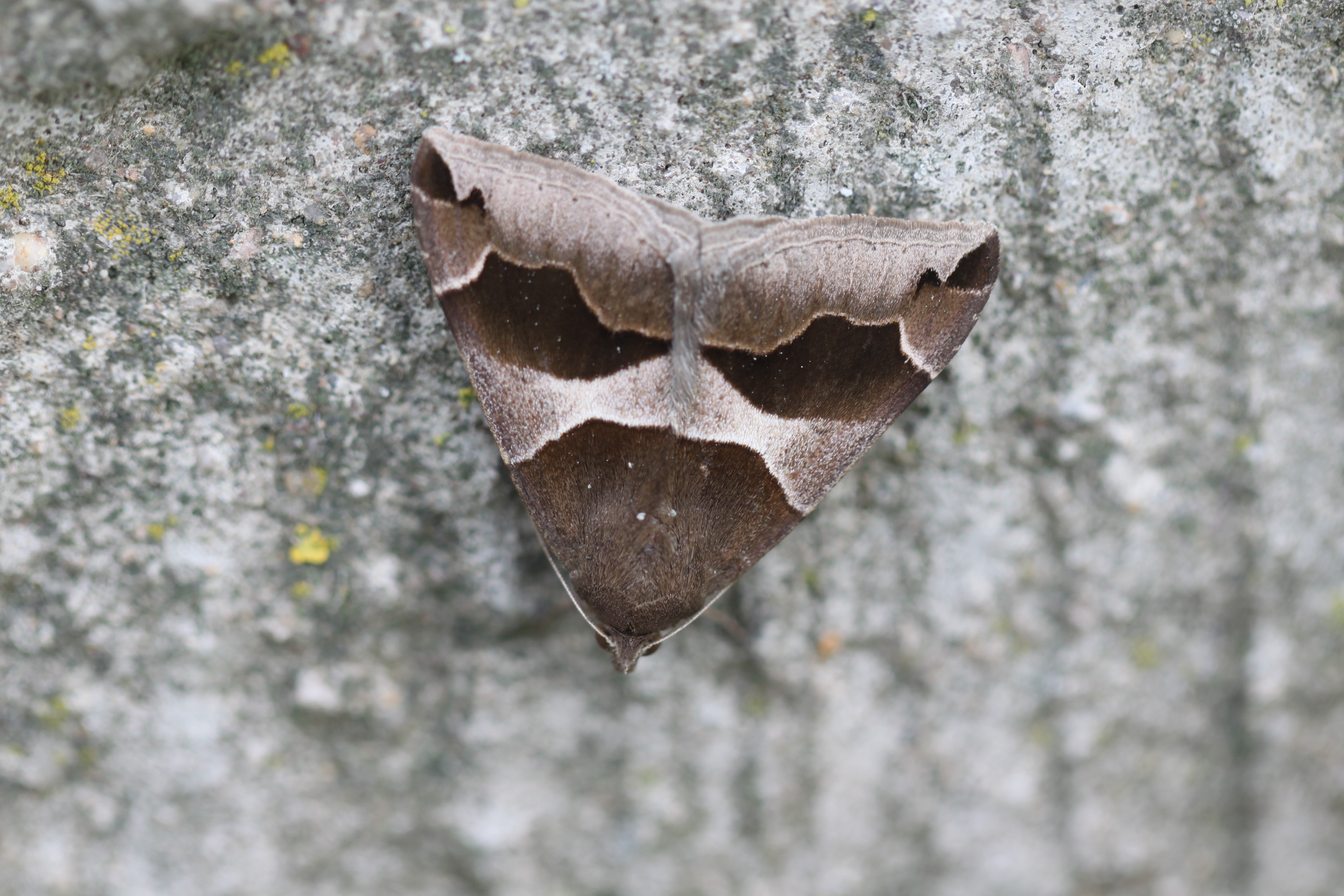 Dysgonia algira am 3. Mai 2020 nahe Heidelberg